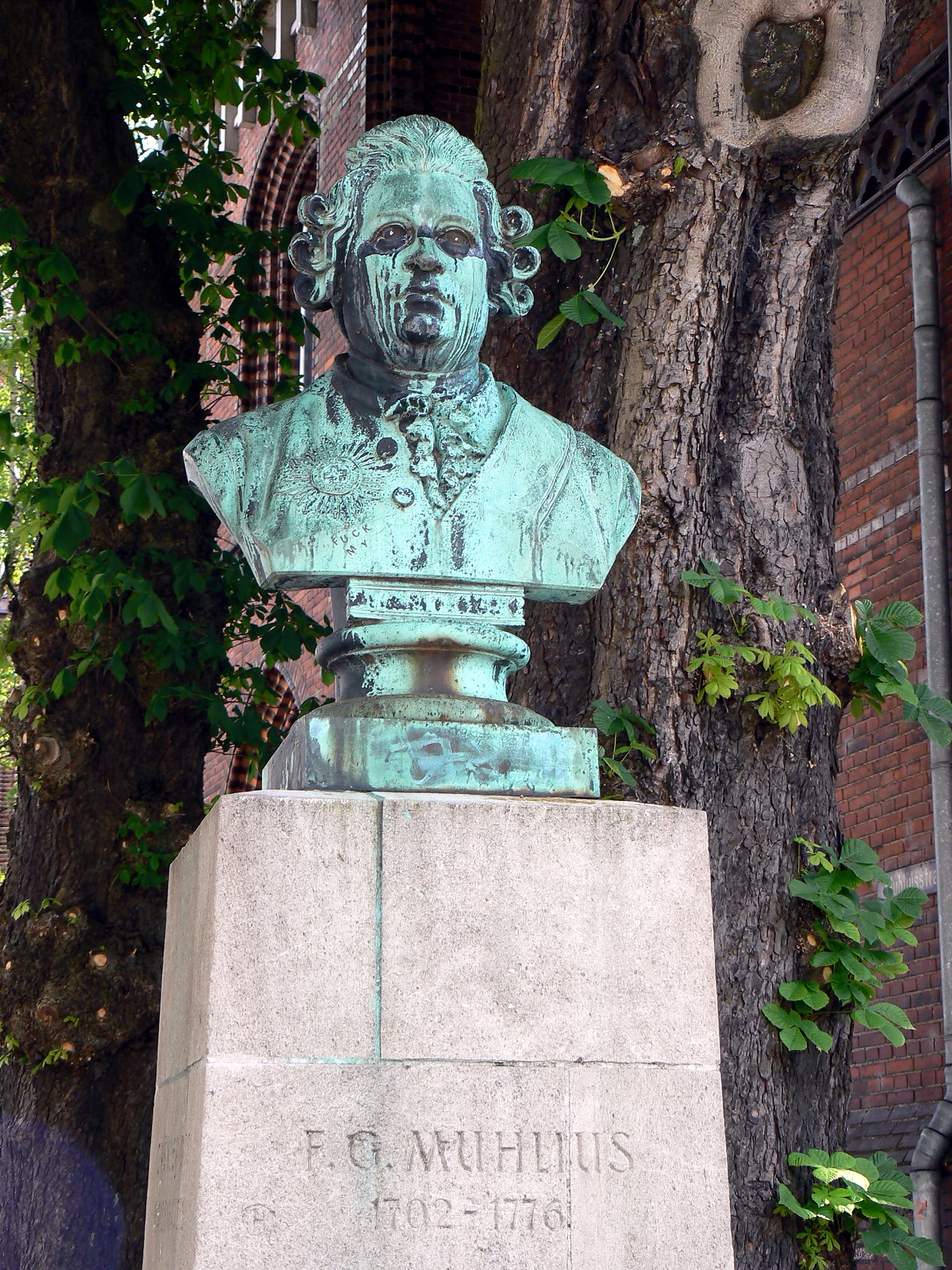 Muhlius-Büste in Kiel zum Gedenken an den Kieler Konferenzrat Friedrich Gabriel Muhlius (1702-1776). Standort: Bergstraße. Bildhauer: Eduard Lürssen, 12. Mai 1867.